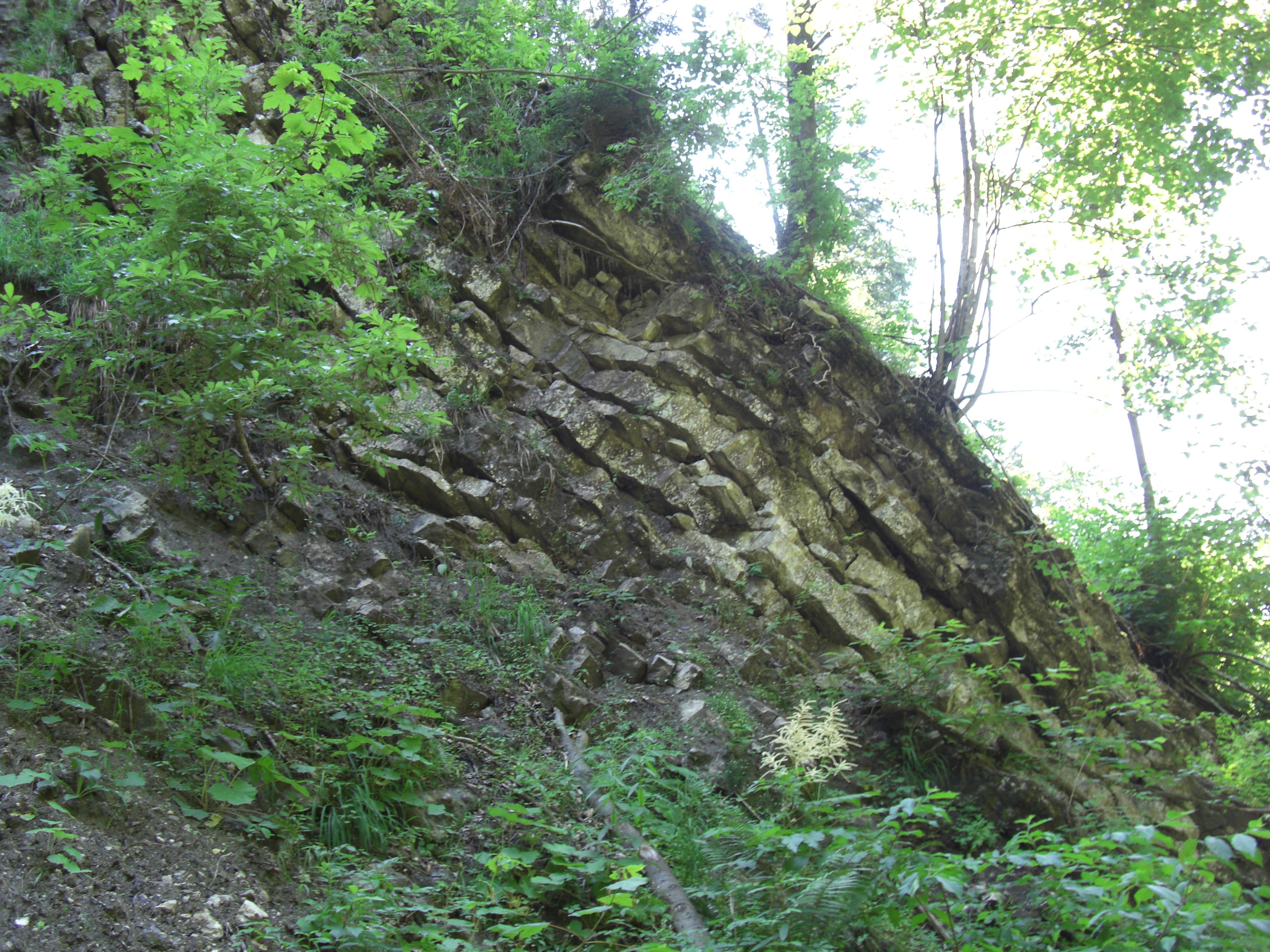 Eingleitungen in der Glasenbachklamm